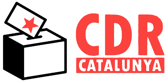 Comités de Defensa de la República